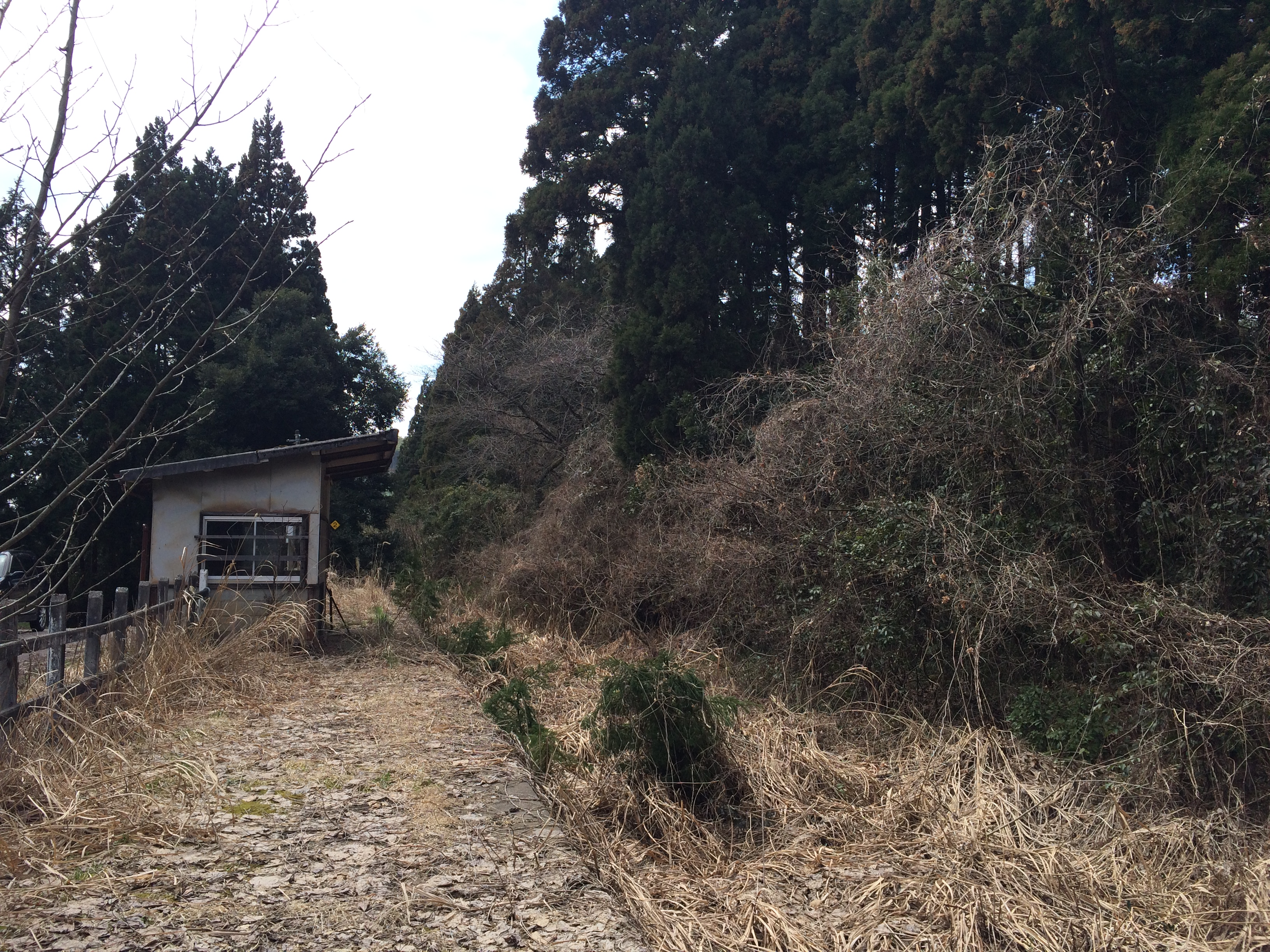 投稿者が撮影